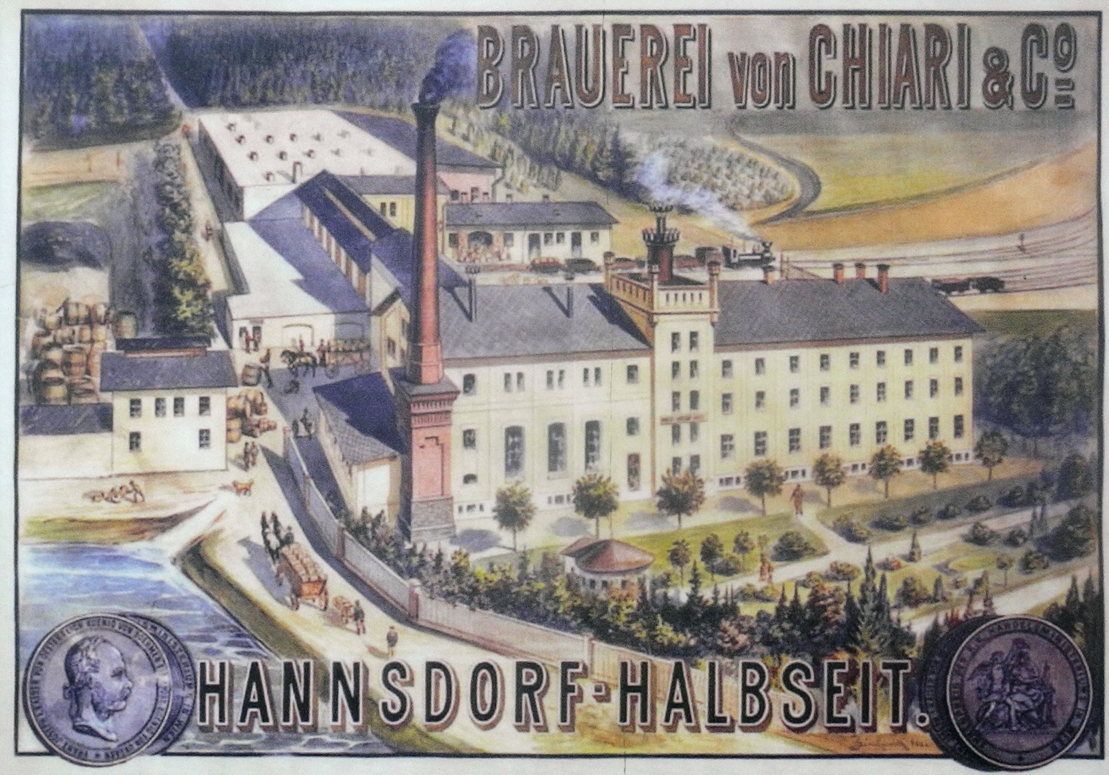 Alte Ansicht der Brauerei von Chiari & Co. in Halbseit, jetzt Brauerei in Holba, OT von Hannsdorf (Hanušovice)